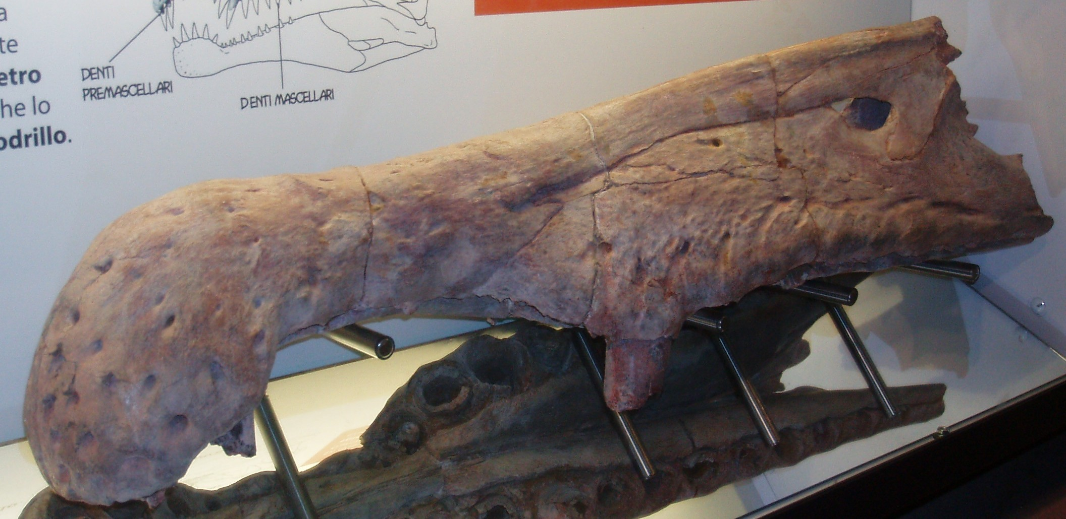 Mascella di Spinosaurus (MSNM V4047) fotografata al Museo di Storia Naturale di Milano